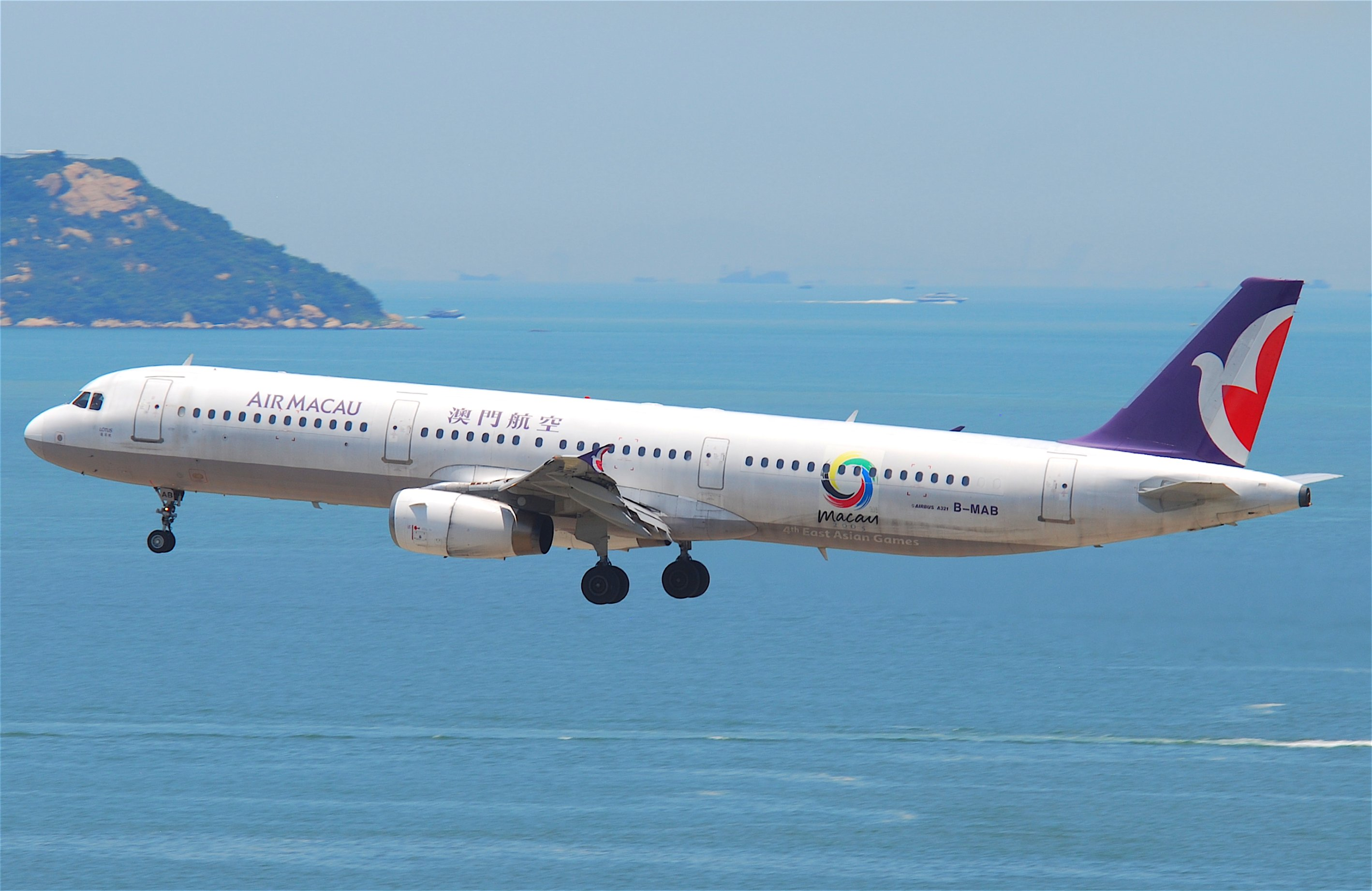 Air Macau Airbus A321-131; B-MAB@HKG;04.08.2011/615lb